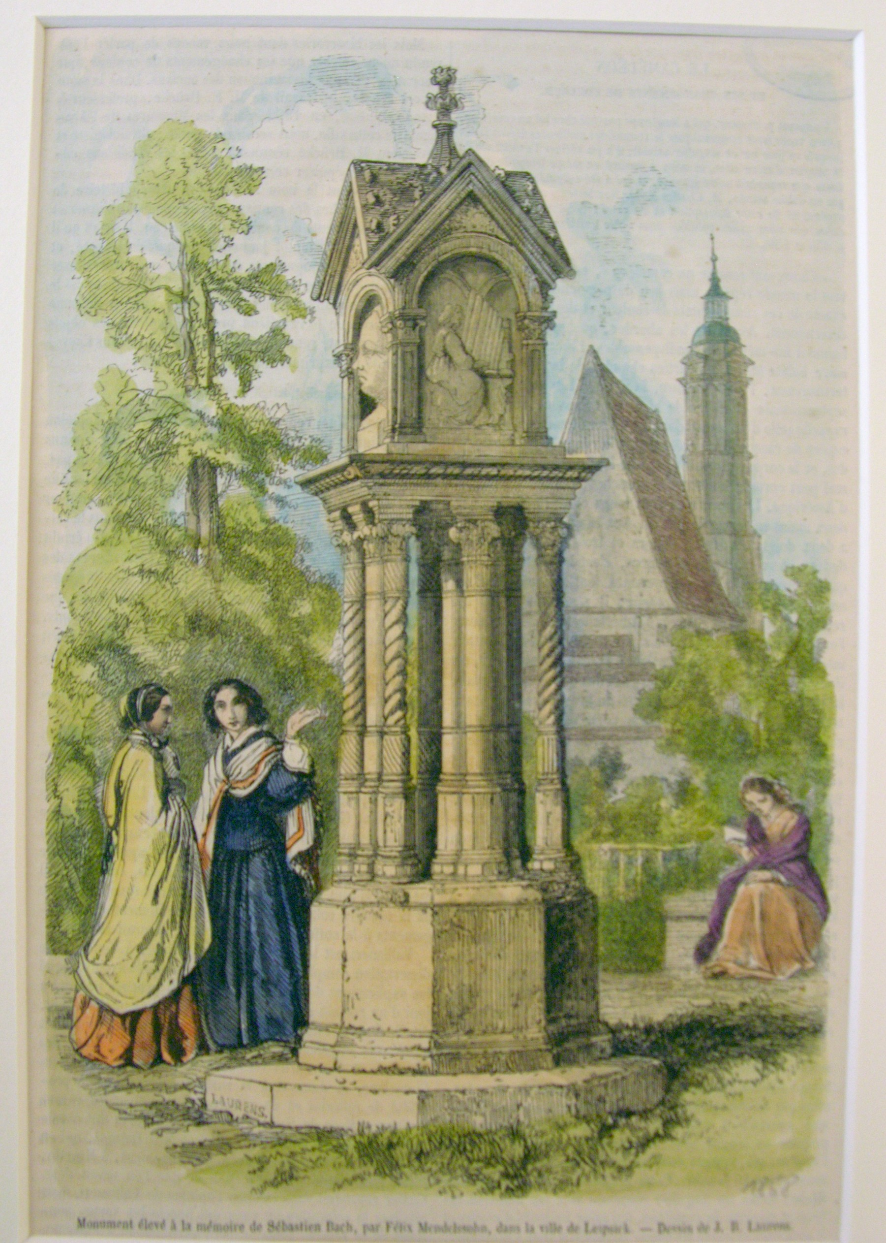 Holzschnitt nach einem Aquarell von Eduard Bendemann, 1850: 1850 hielt Eduard Bendemann das von ihm mitentworfene Dankmal in einem bekannten Aquarell mit romantisch idealisierter Szenerie fest. Dieses Aquarell wurde später häufig nachgestochen und in Zeitschriften abgedruckt - selbst im französischen Sprachraum. Genäuere Beschreibung, siehe Image:Beschreibung Holzstich Bach-Archiv.jpg